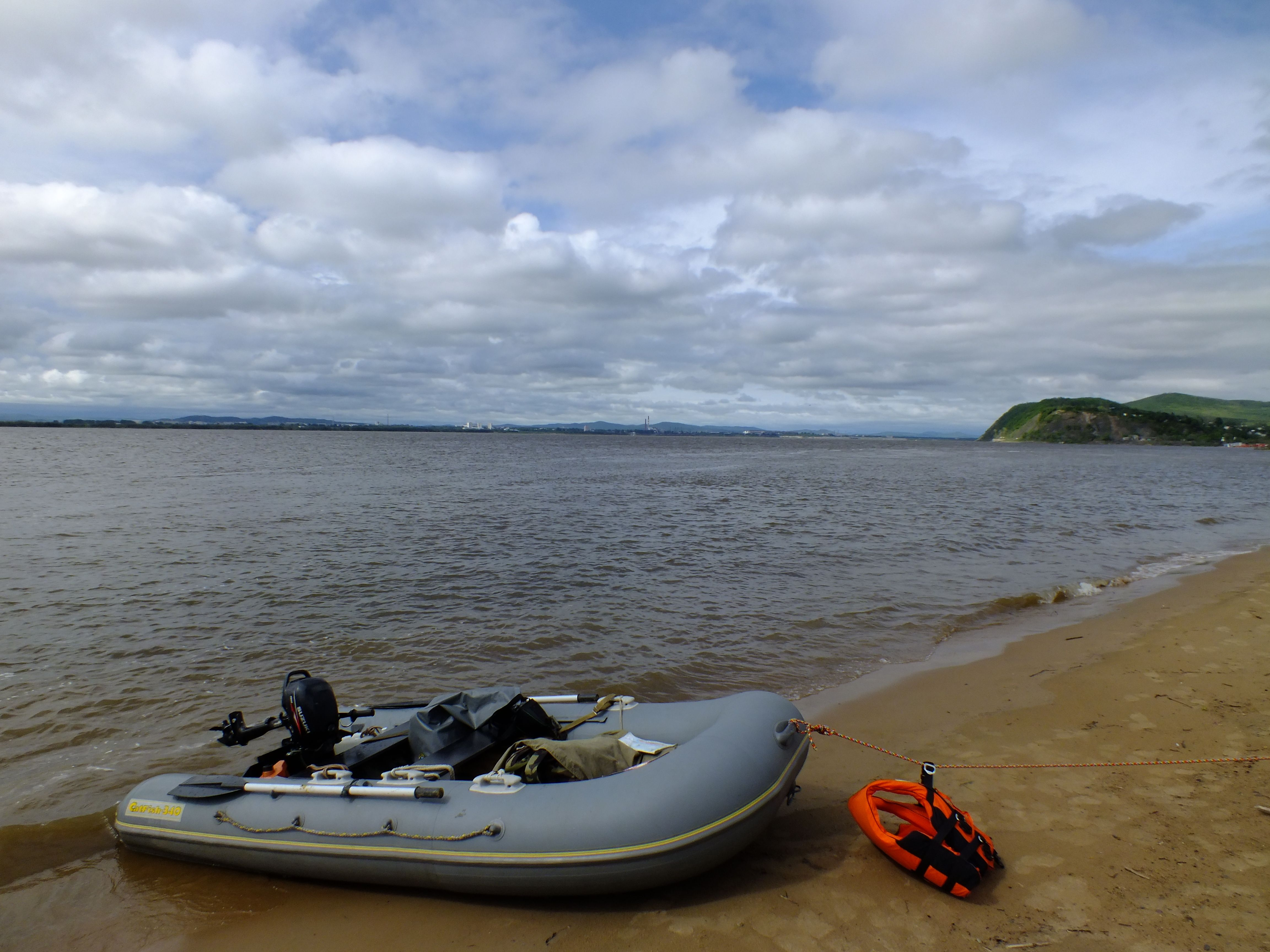 Справа Пивань, слева Комсомольск-на-Амуре